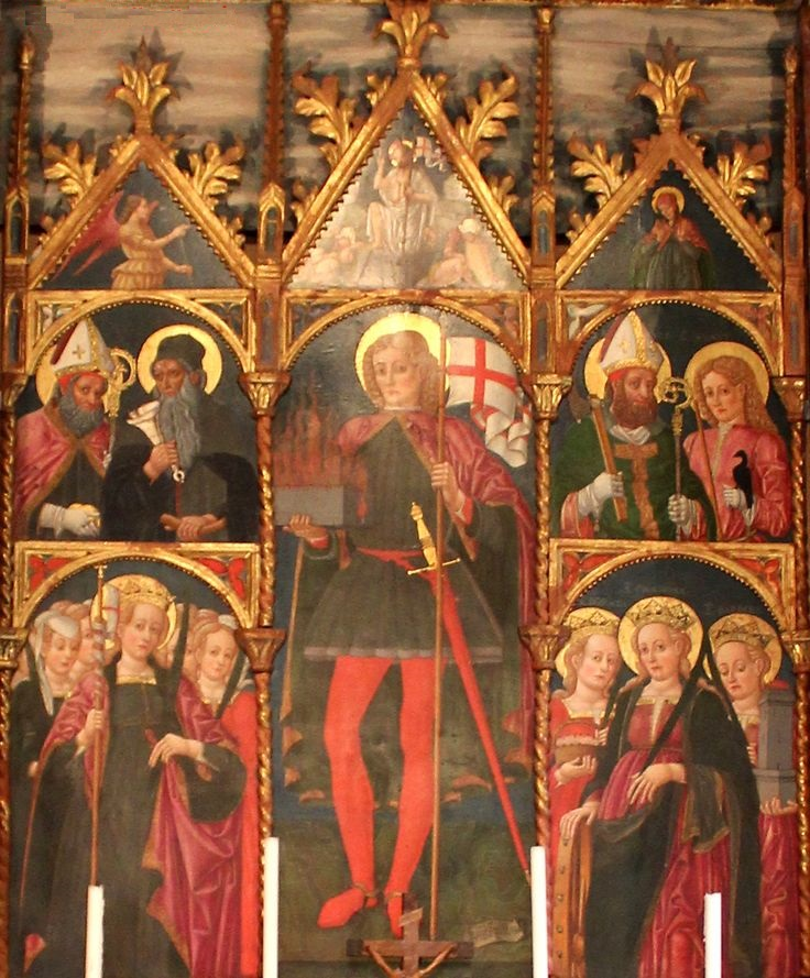 Il polittico di Andrea Bellunello, datato 1480, raffigurante San Floriano in preziose vesti cortesi, Chiesetta di San Floriano, Forni di Sopra, Friuli Venezia Giulia, Italia.